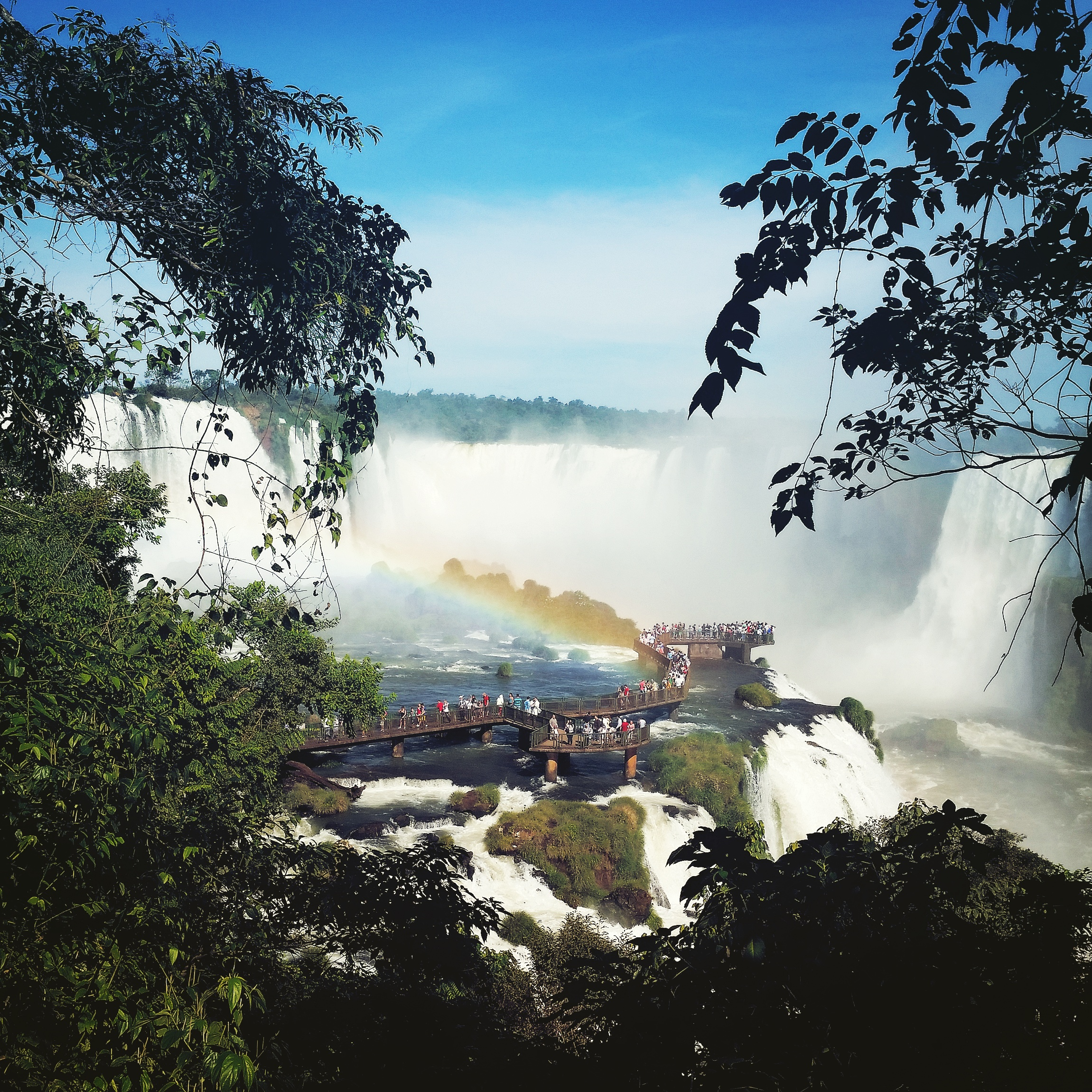 Esta foto foi tirada no Parque Nacional do Iguaçu, Foz do Iguaçu, Paraná, Brasil. Onde evidência a riqueza natural do nosso país.